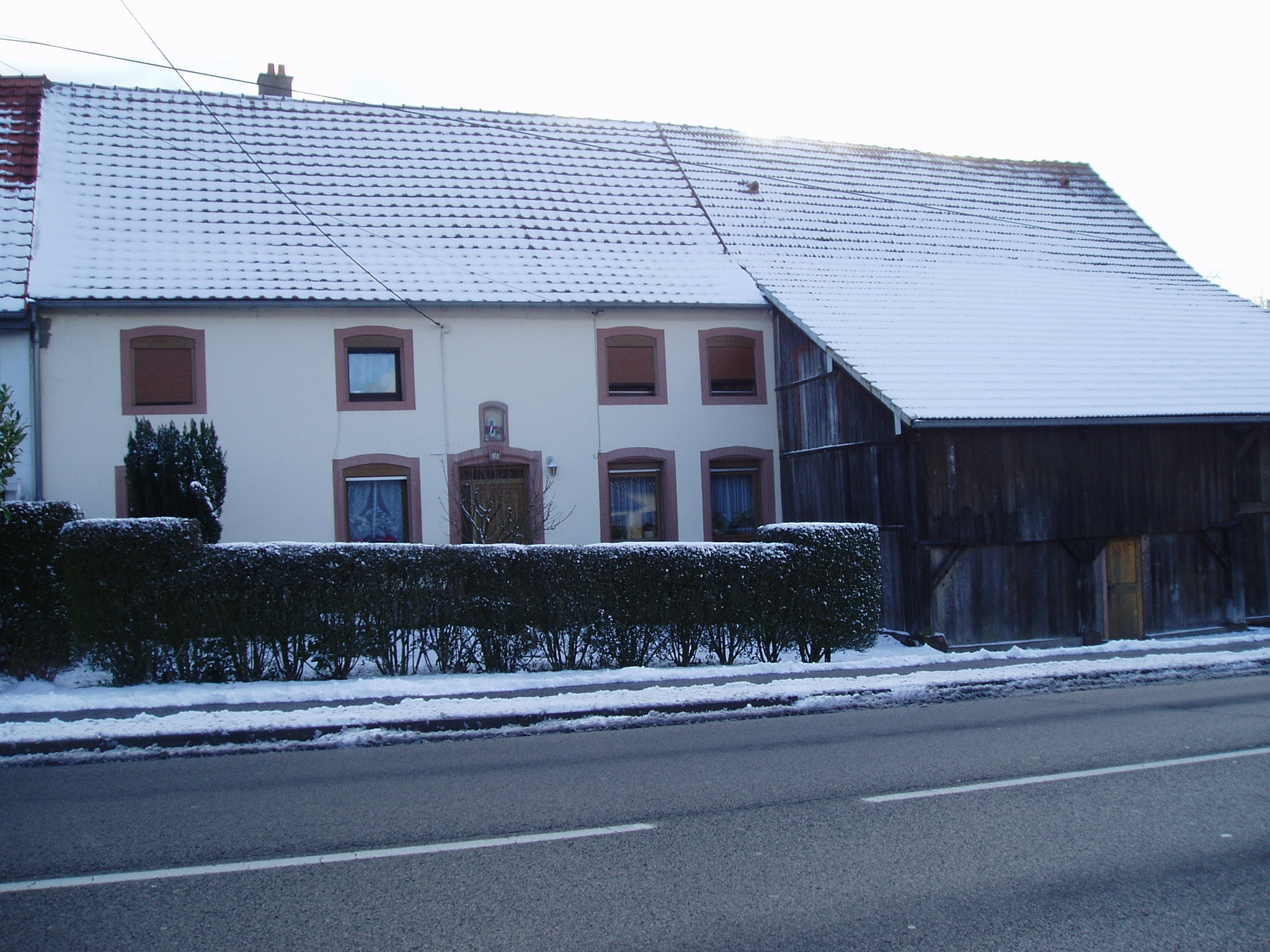 Maison à Schopp, Danne-et-Quatre-Vents, Moselle